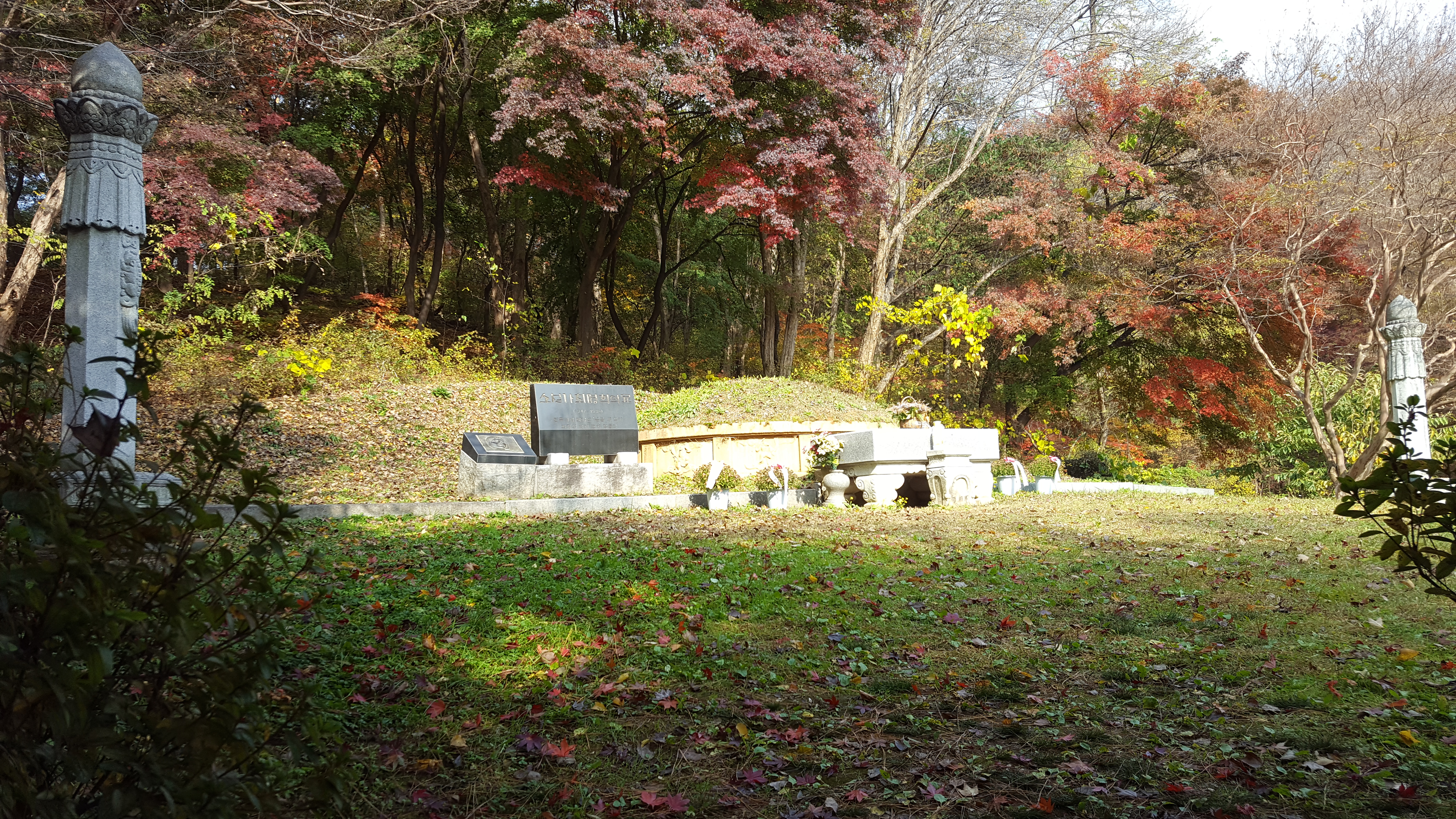 소설가 최명희 무덤